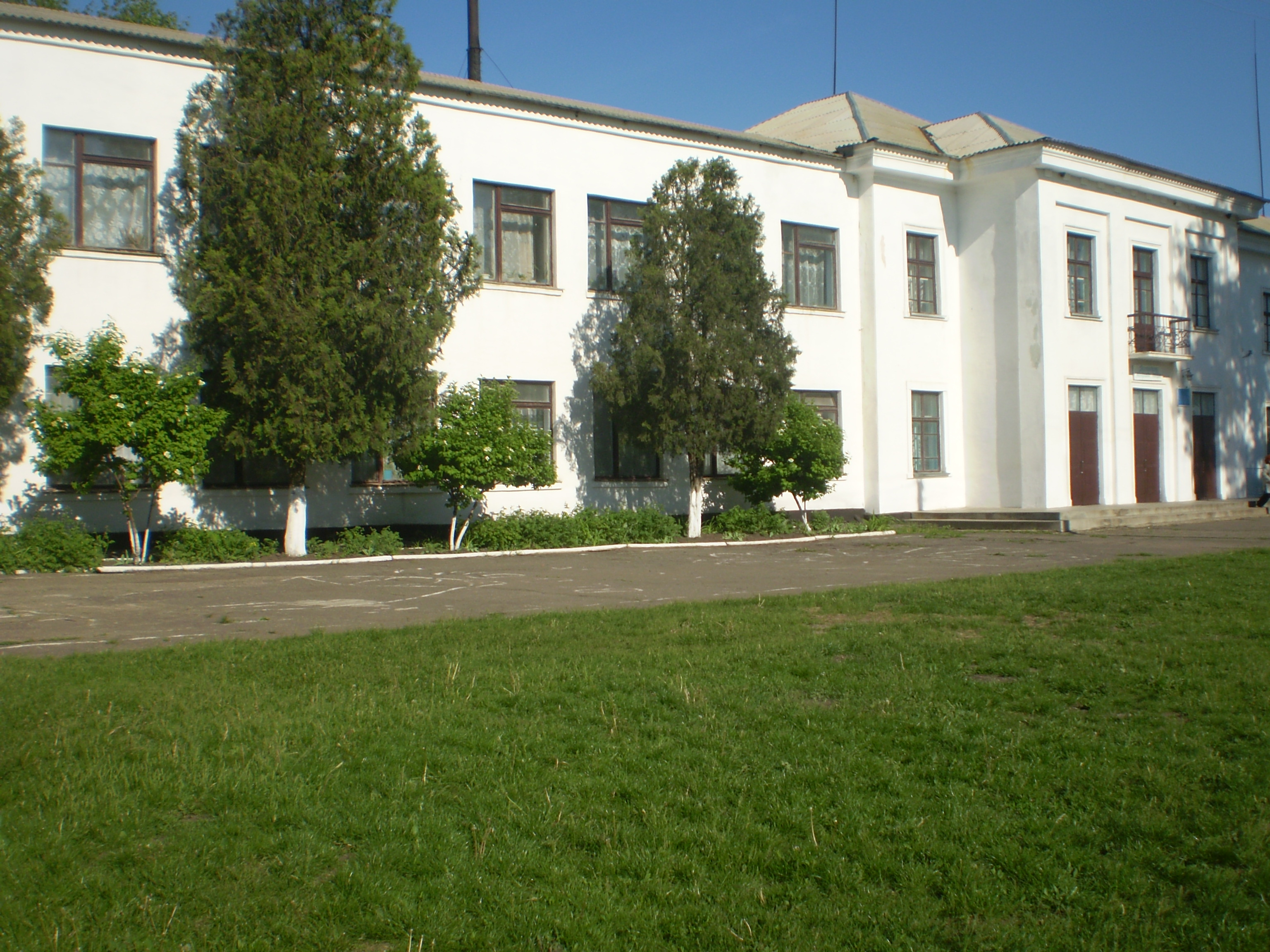 Кудрявцівська ЗОШ І-ІІІ ступенів